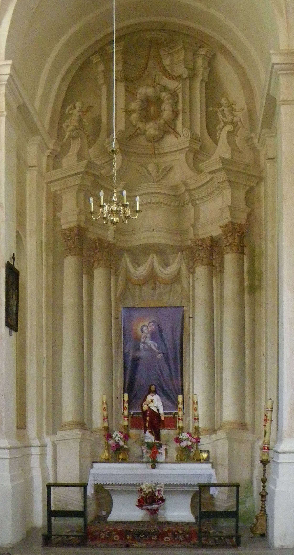 Беларуская (тарашкевіца): Комплекс былога кляштара бэрнардынцаў, дэкаратыўнае аздабленьне касьцёла: галоўны і бакавыя алтары росьпісы. в. Будслаў This is a photo of Belarusian heritage monument. Reference number: 611Г000422 ( WLM)